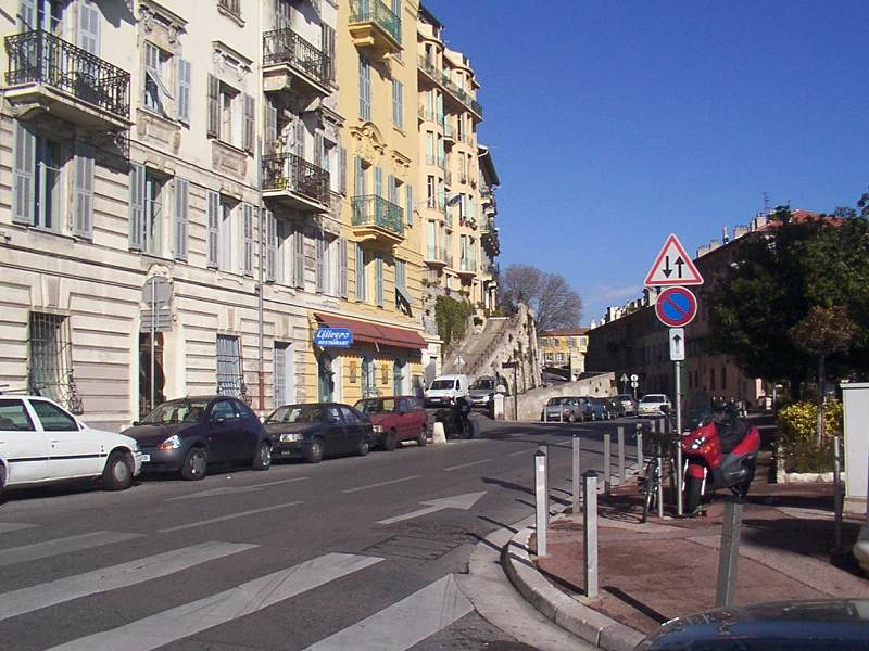 La Rue de Foresta à son départ du Monument aux Morts. A droite le square Guynemer.